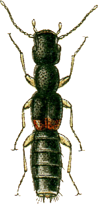 This file has been extracted from another file: Jacobs14.jpg